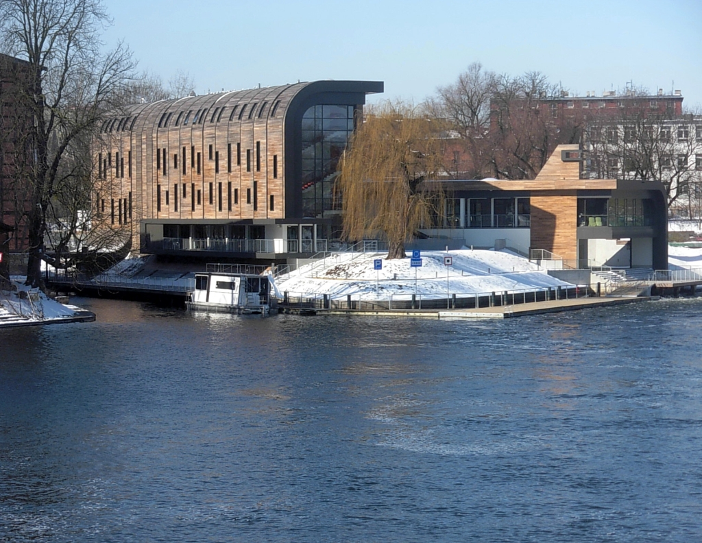 Przystań Bydgoszcz na Wyspie Młyńskiej